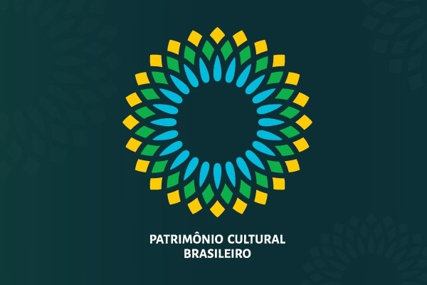 Emblema oficial do Patrimônio Cultural Brasileiro (variação em jpg com fundo escuro) utilizado para identificar os bens tombados como patrimônio nacional pelo Instituto do Patrimônio Histórico e Artístico Nacional (Iphan). Foi selecionado por concurso público em 2017.